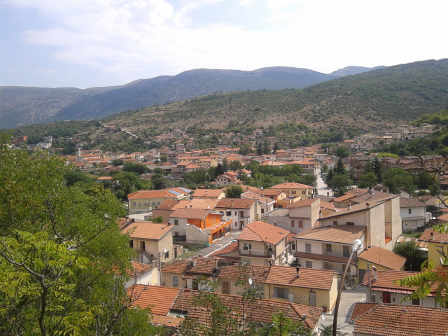 Foto panoramica di Lecce nei Marsi